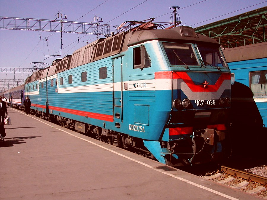 Электровоз ЧС7-038 с пассажирским поездом «Polonez» Москва — Варшава на Белорусском вокзале Москвы. 20 августа 2005 года